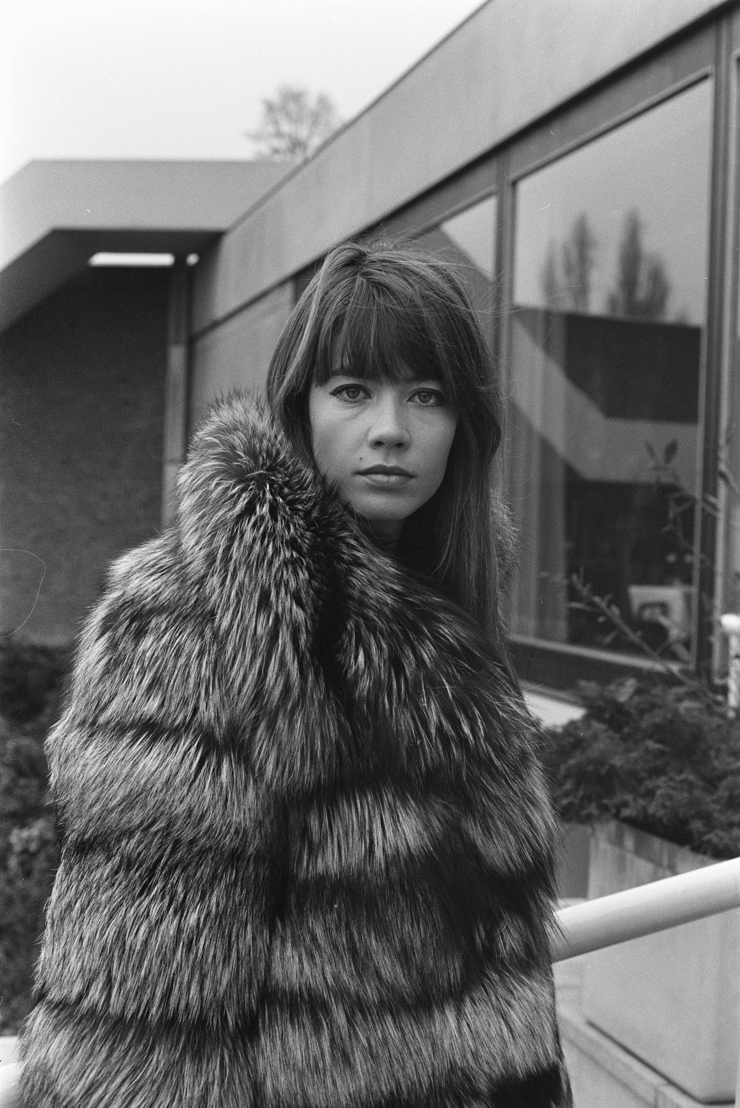 Collectie / Archief : Fotocollectie Anefo Reportage / Serie : [ onbekend ] Beschrijving : Franse zangeres-actrice Francoise Hardy in Amsterdam Datum : 16 december 1969 Locatie : Amsterdam, Noord-Holland Trefwoorden : zangeressen Persoonsnaam : Francoise Hardy Fotograaf : Evers, Joost / Anefo Auteursrechthebbende : Nationaal Archief Materiaalsoort : Negatief (zwart/wit) Nummer archiefinventaris : bekijk toegang 2.24.01.05 Bestanddeelnummer : 923-0820